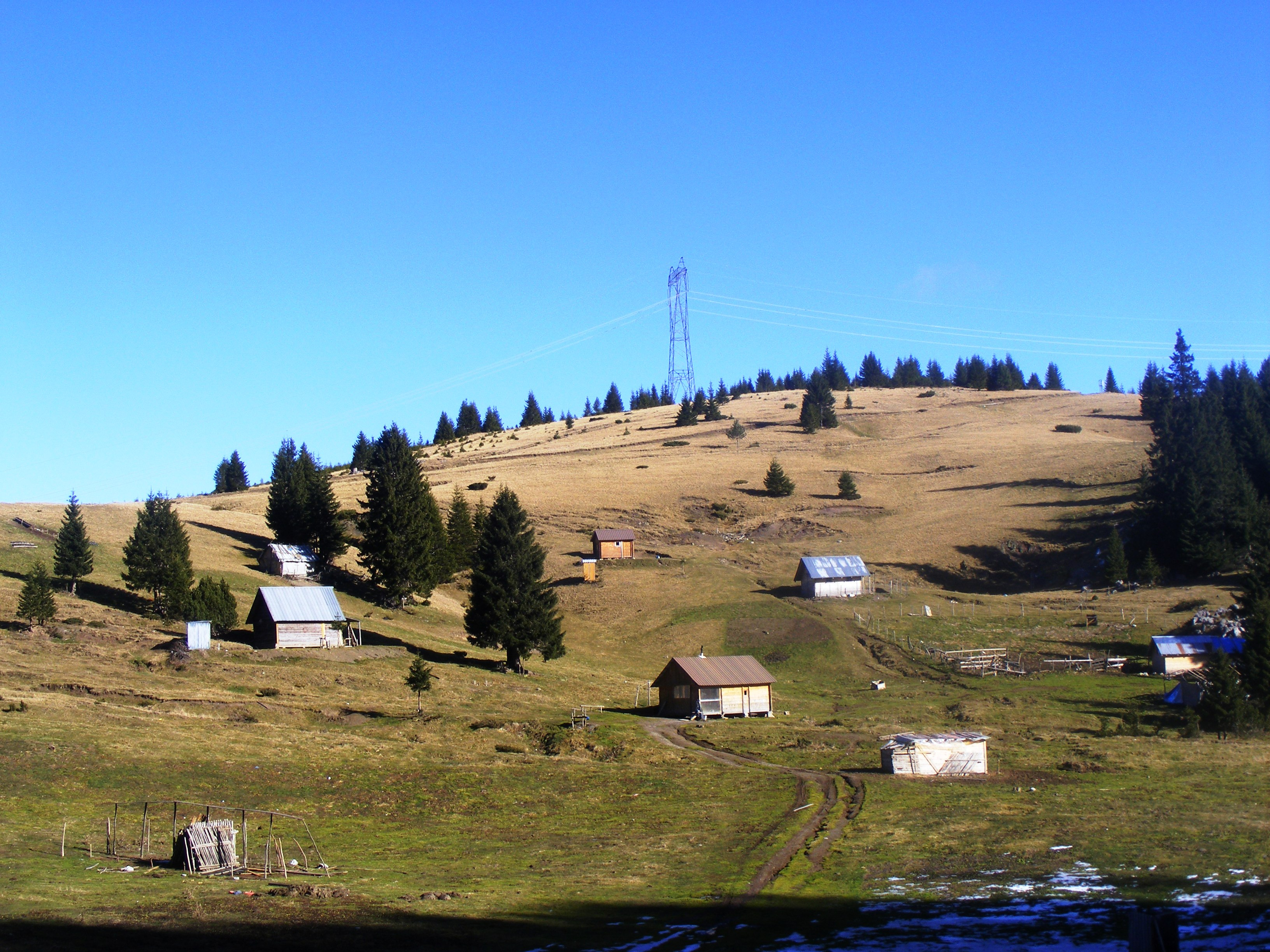 Stanet kosovare në afërsi të Kullës, në anën e djatht të rrugës Pejë-Kullë -Rozhajë